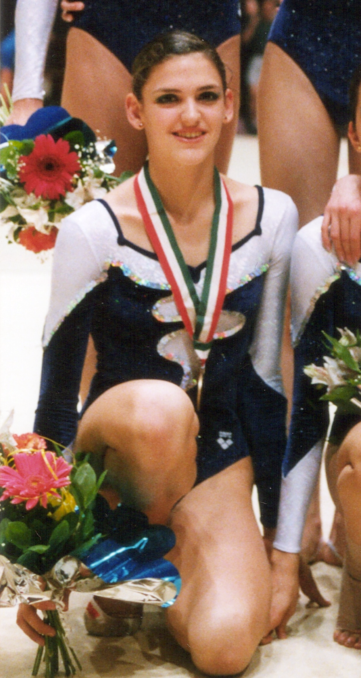 Paula Orive en 1999 con la medalla de bronce en el Europeo de Budapest.